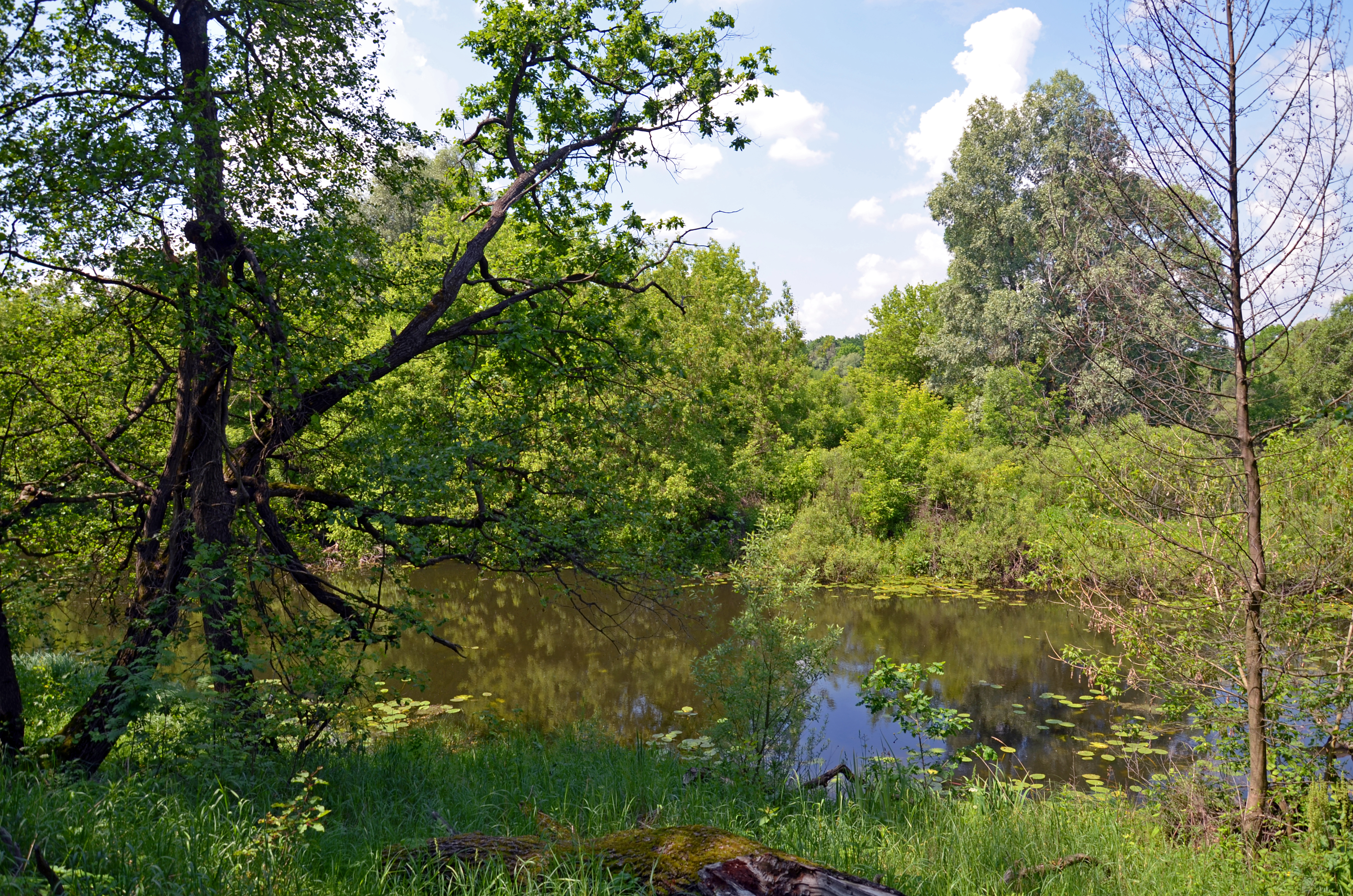 Дубові насадження, Бородянський район, Пісківська селищна рада